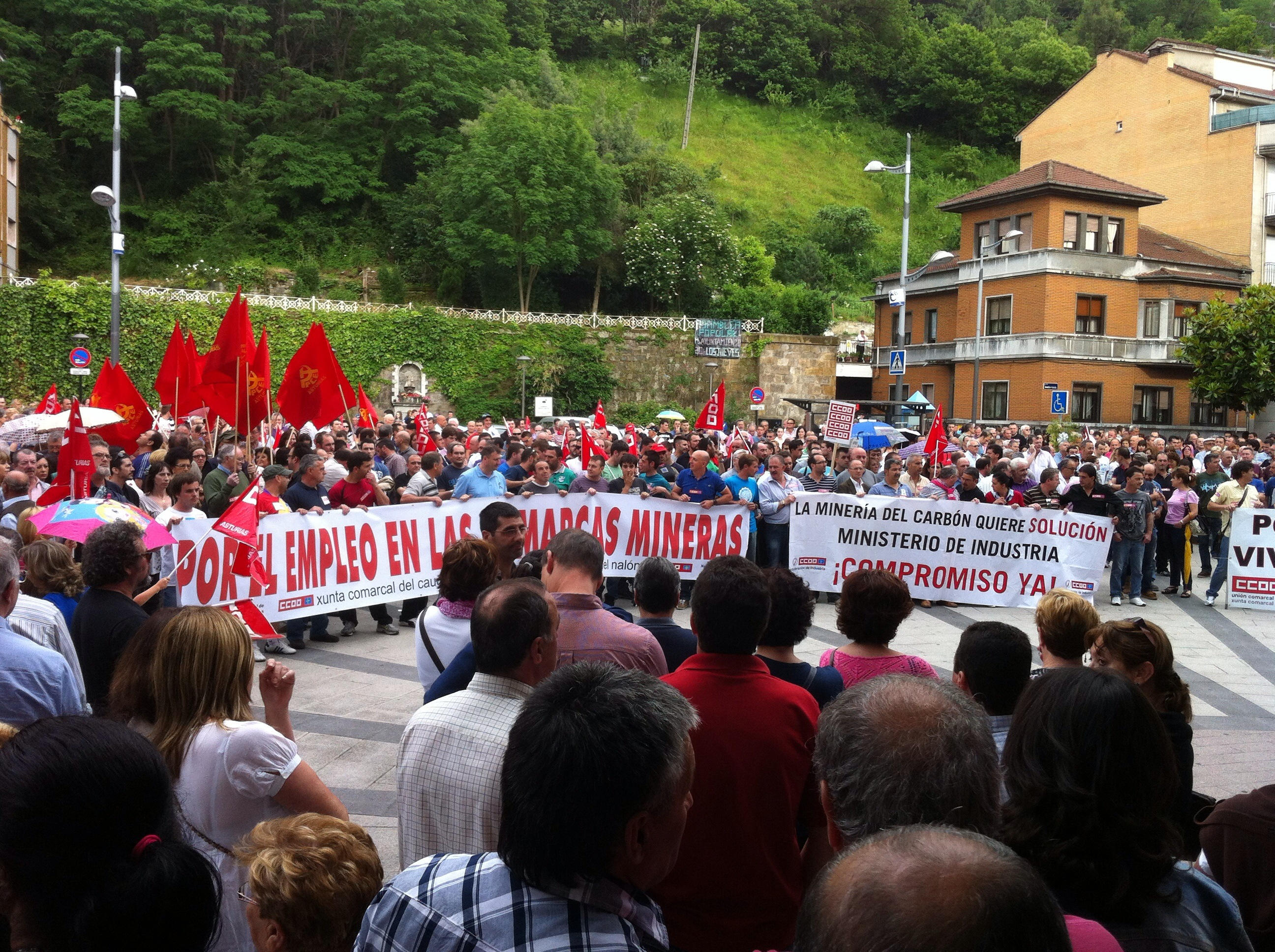 Concentración por la defensa de la minería en Mieres (Asturias). Huelga indefinida de la minería del carbón en España.